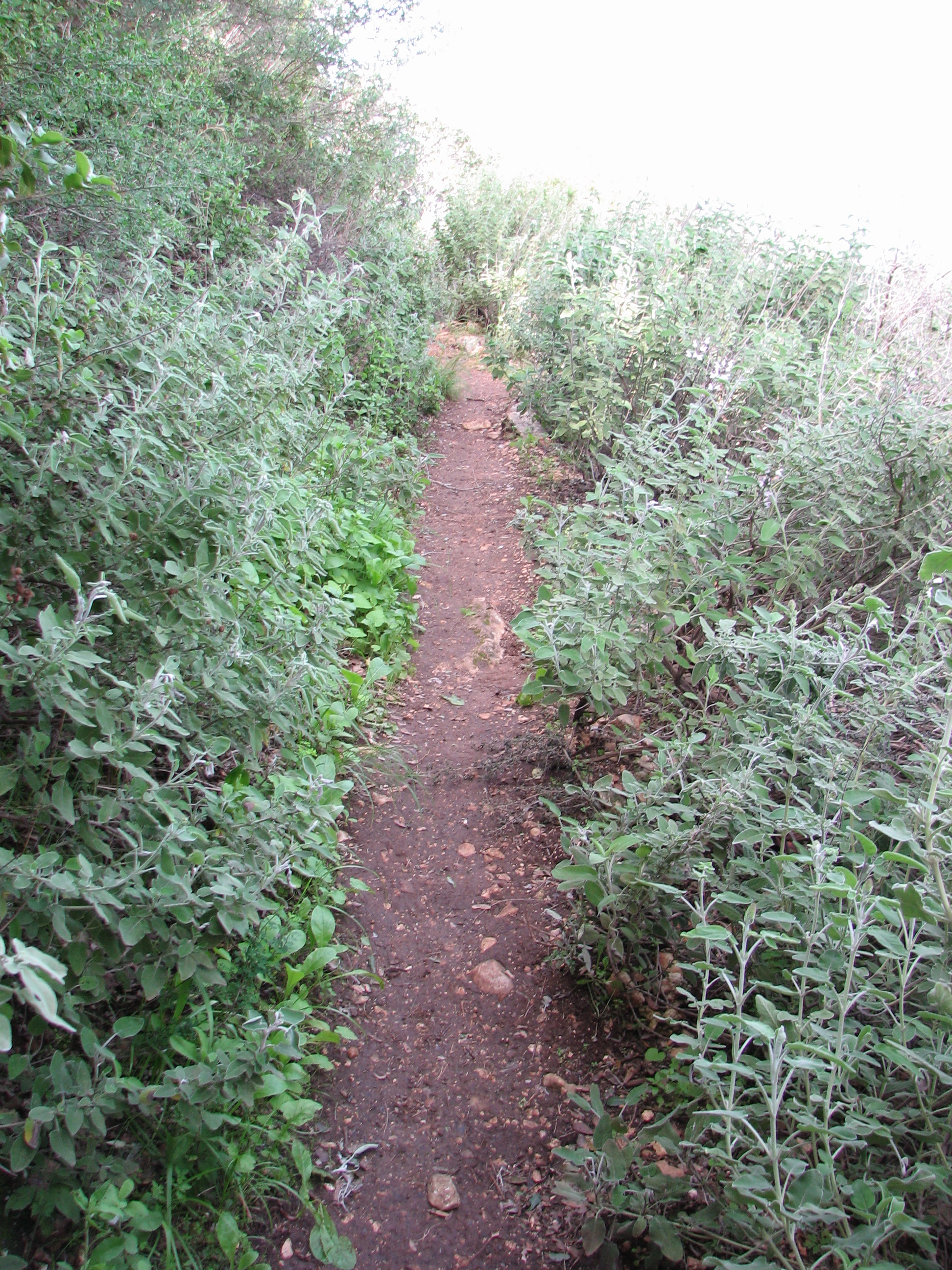 Green Paths, between Nesher - Yagur on Mount Carmel Israel. View from the path השביל הירוק בין העיר נשר וקיבוץ יגור, על הצלע הצפונית של הר הכרמל. מראות על השביל Salvia fruticosa שביל ומשני צידיו מרווה משולשת